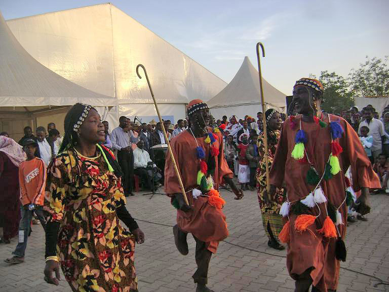 رقصة المردوم-تراث البقارة